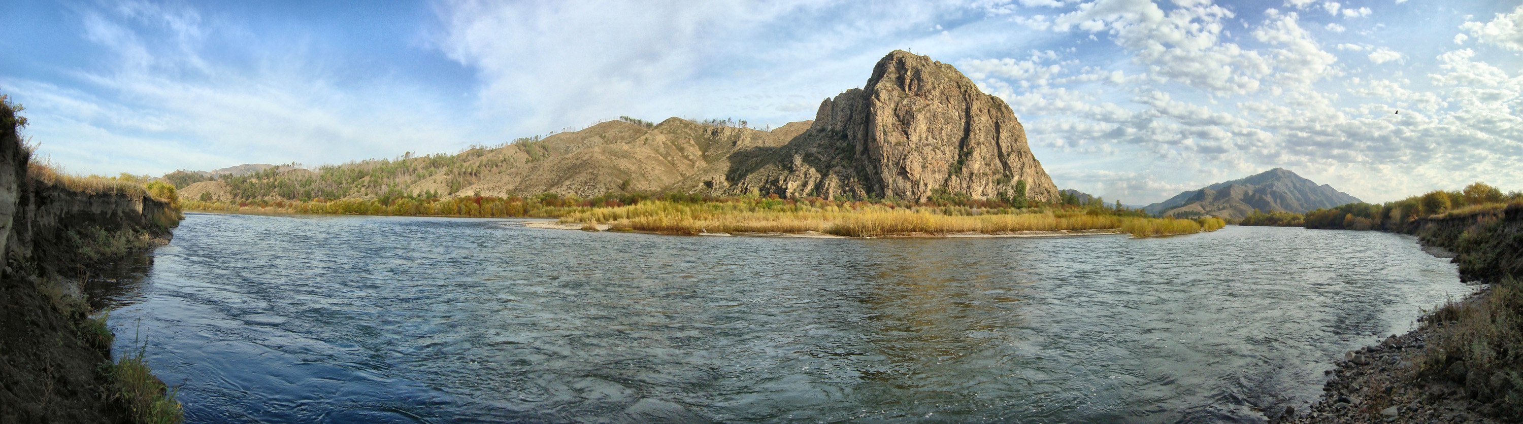 fall, Seleng river